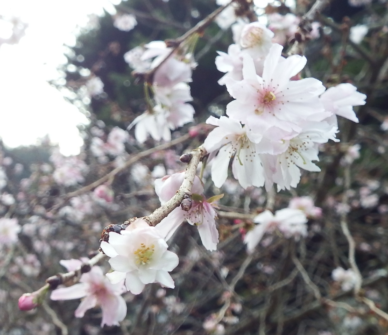 三角寺の四季桜をアップで